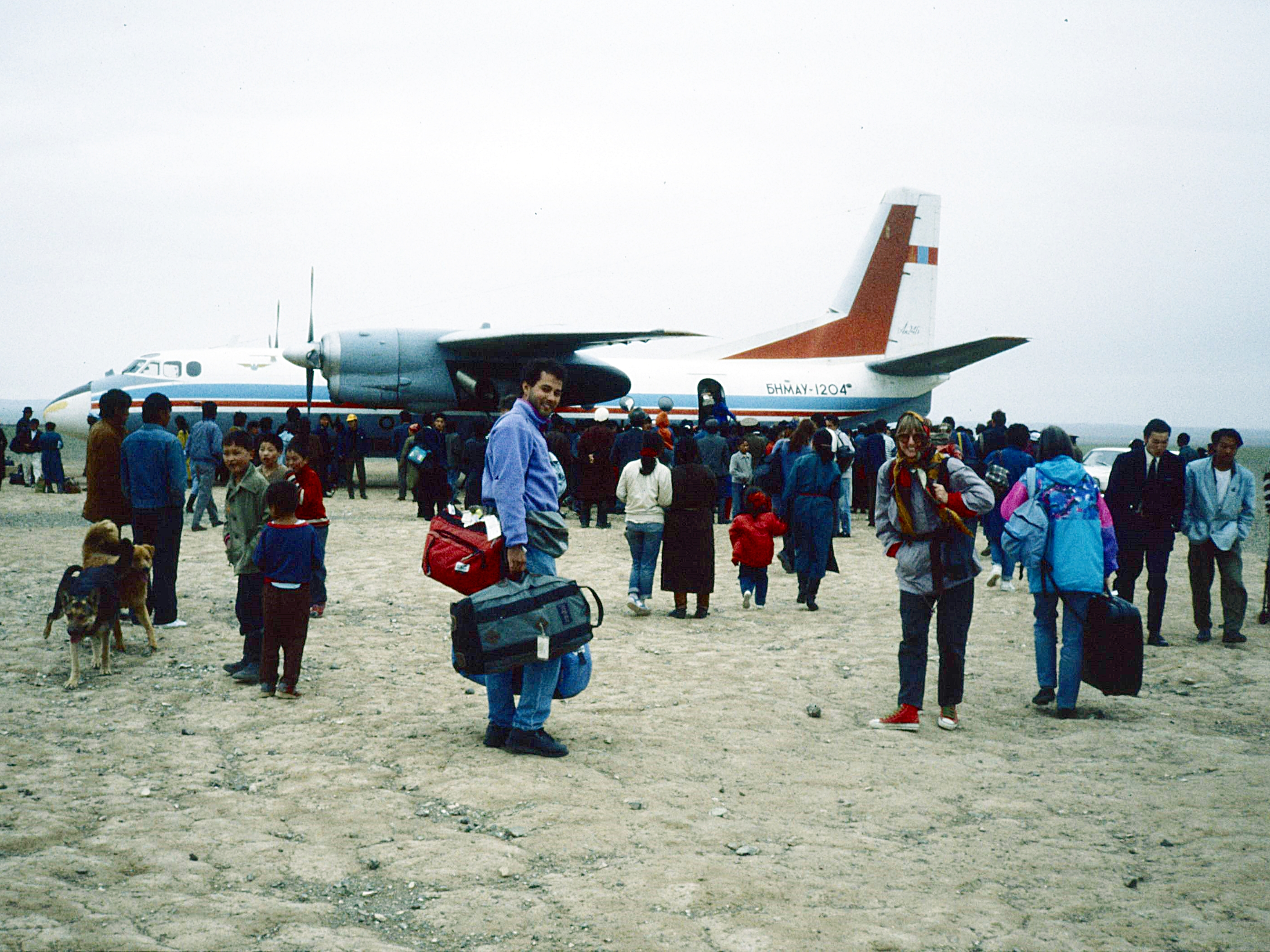 Boarding einer Antonov 24 auf dem unbefestigten Flugplatz in Dalandsadagad im Jahr 1990